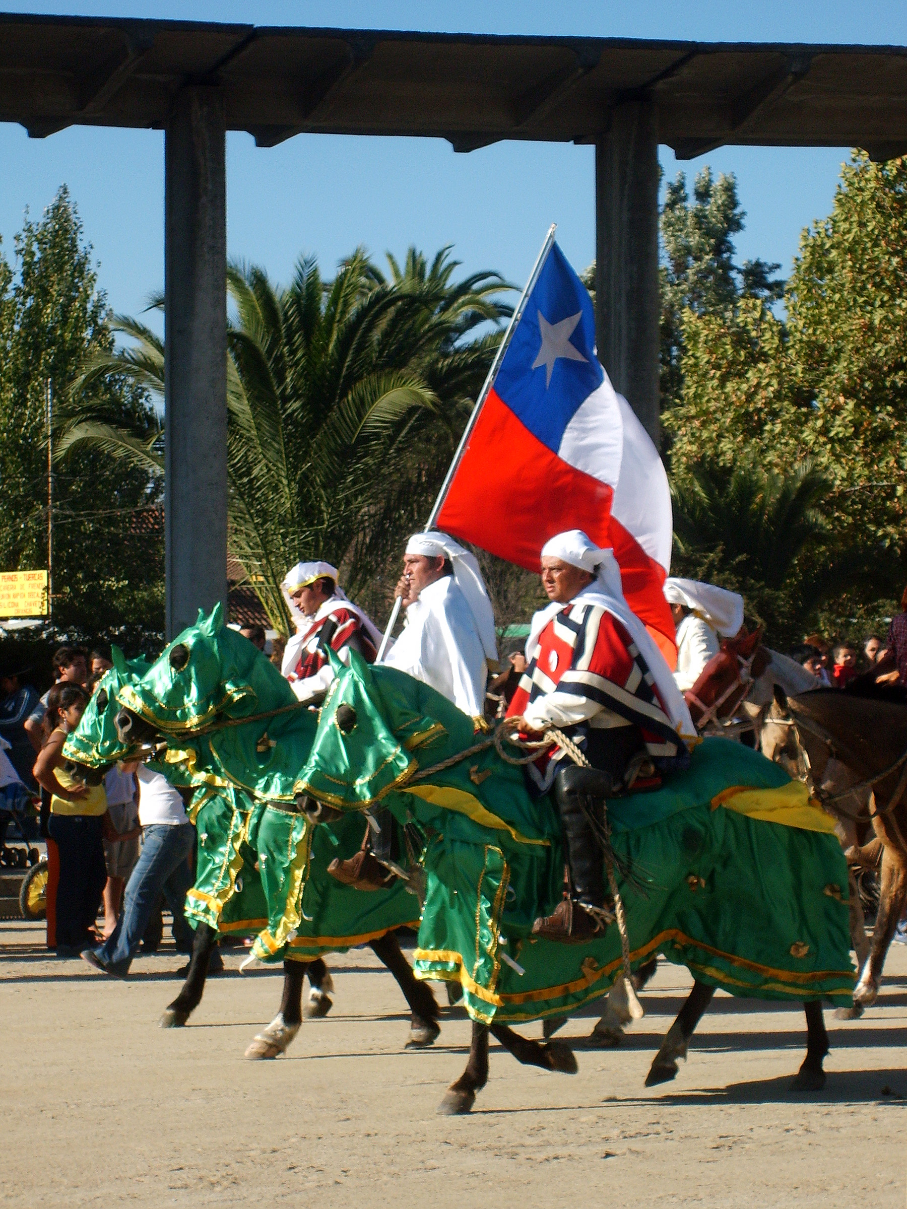 Jinetes participantes del Cuasimodo, llegando al Templo Votivo de Maipú. 30 de marzo de 2008, Santiago de Chile.